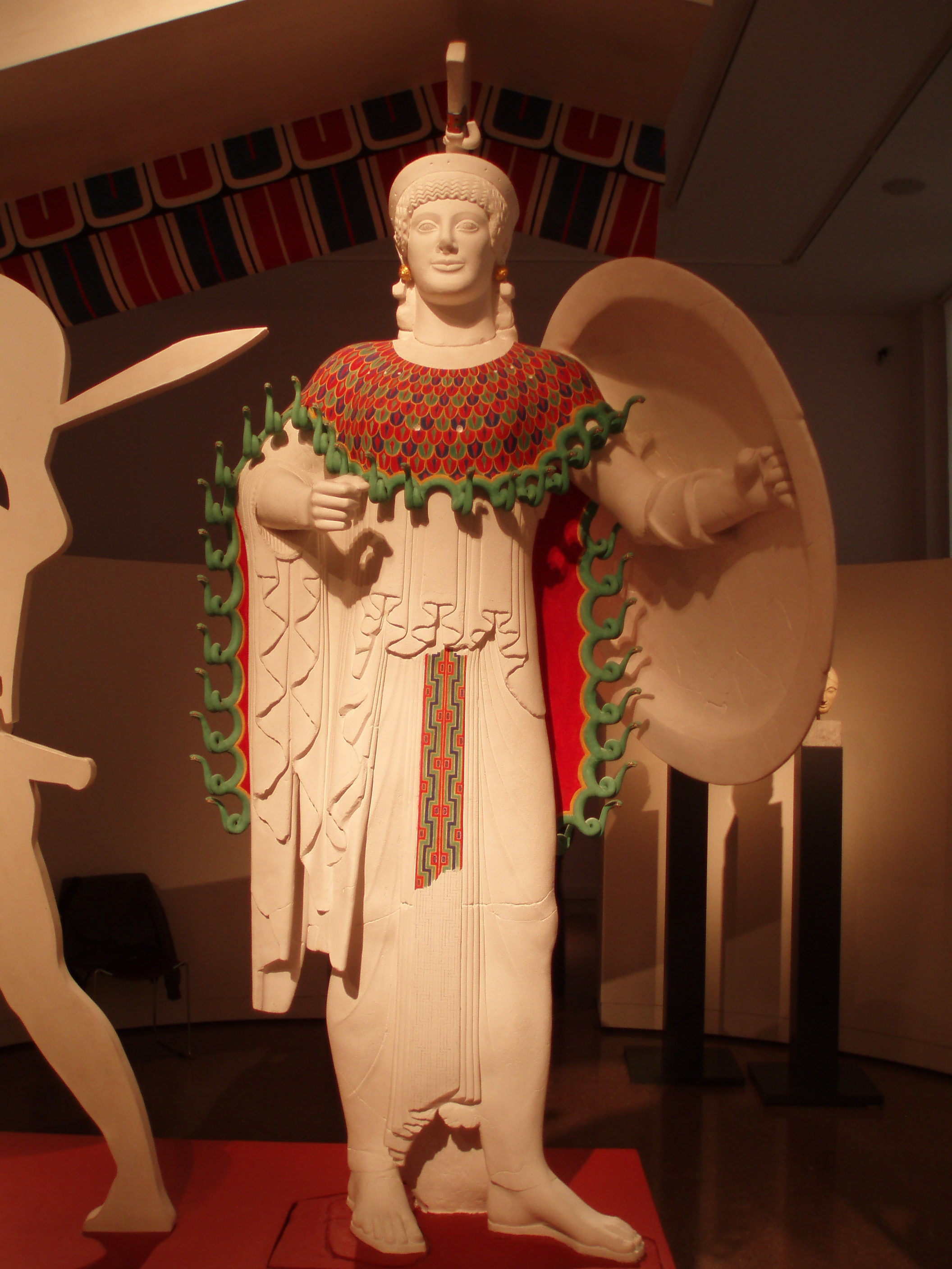 Restitution du décor polychrome de la déesse Athéna provenant du fronton Ouest temple d'Athéna Aphaia à Égine. Vers 490 av. J.-C. Exposition « Bunte Götter » dans la version montrée à Athènes.Etude : Vinzenze Brinkmann. Restauration : Sylvia Kellner et Olaf Herzog. Peinture : Ulrike Koch-Brinkmann et Sylvia Kellner. Original : Glyptothèque de Munich.